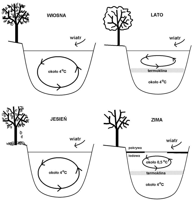 Miksja